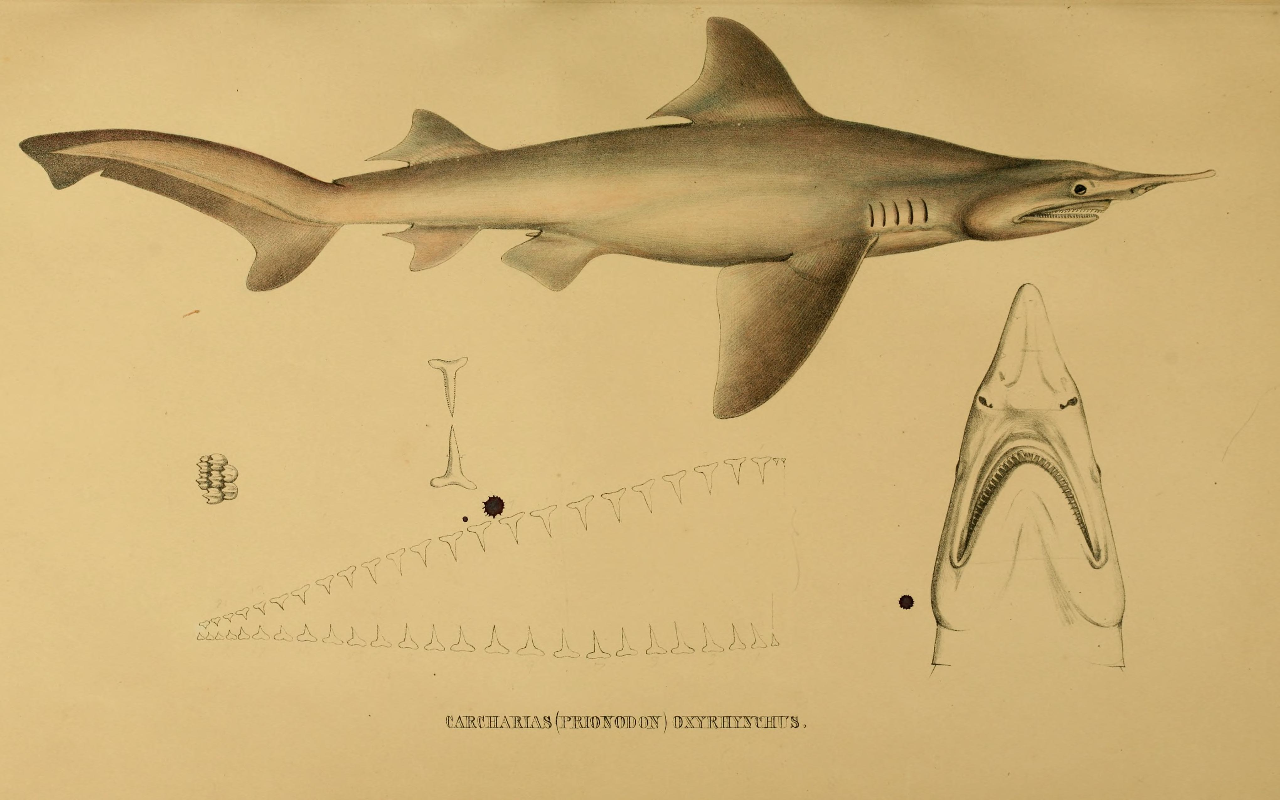 Isogomphodon oxyrhynchus syn. Carcharias oxyrhynchus Systematische Beschreibung der Plagiostomen / von dr. J. Müller und dr. J. Henle.